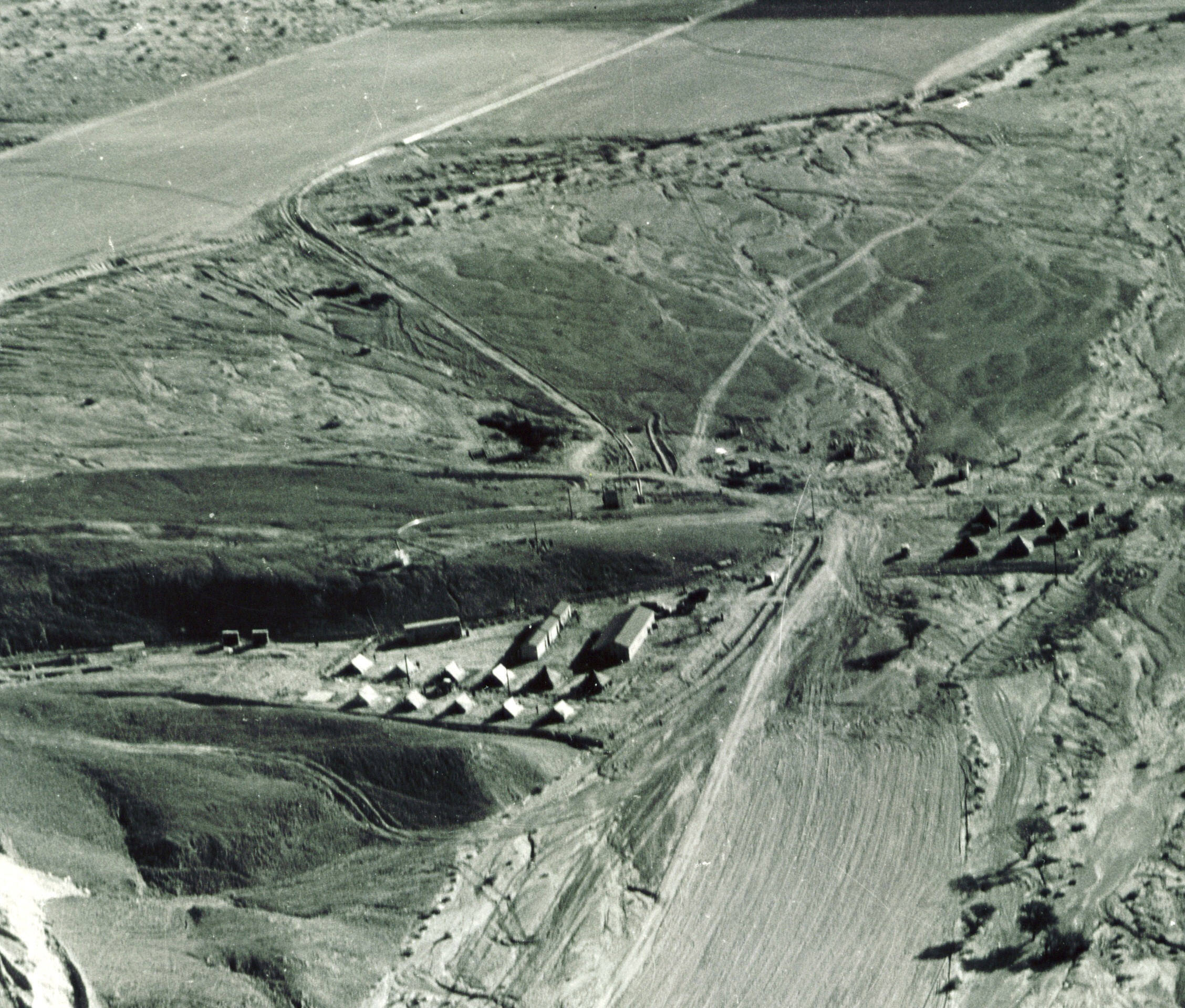 צולם בסוף 1963 קטע מצילום אויר של המחנה הזמני של האחזות גרופית